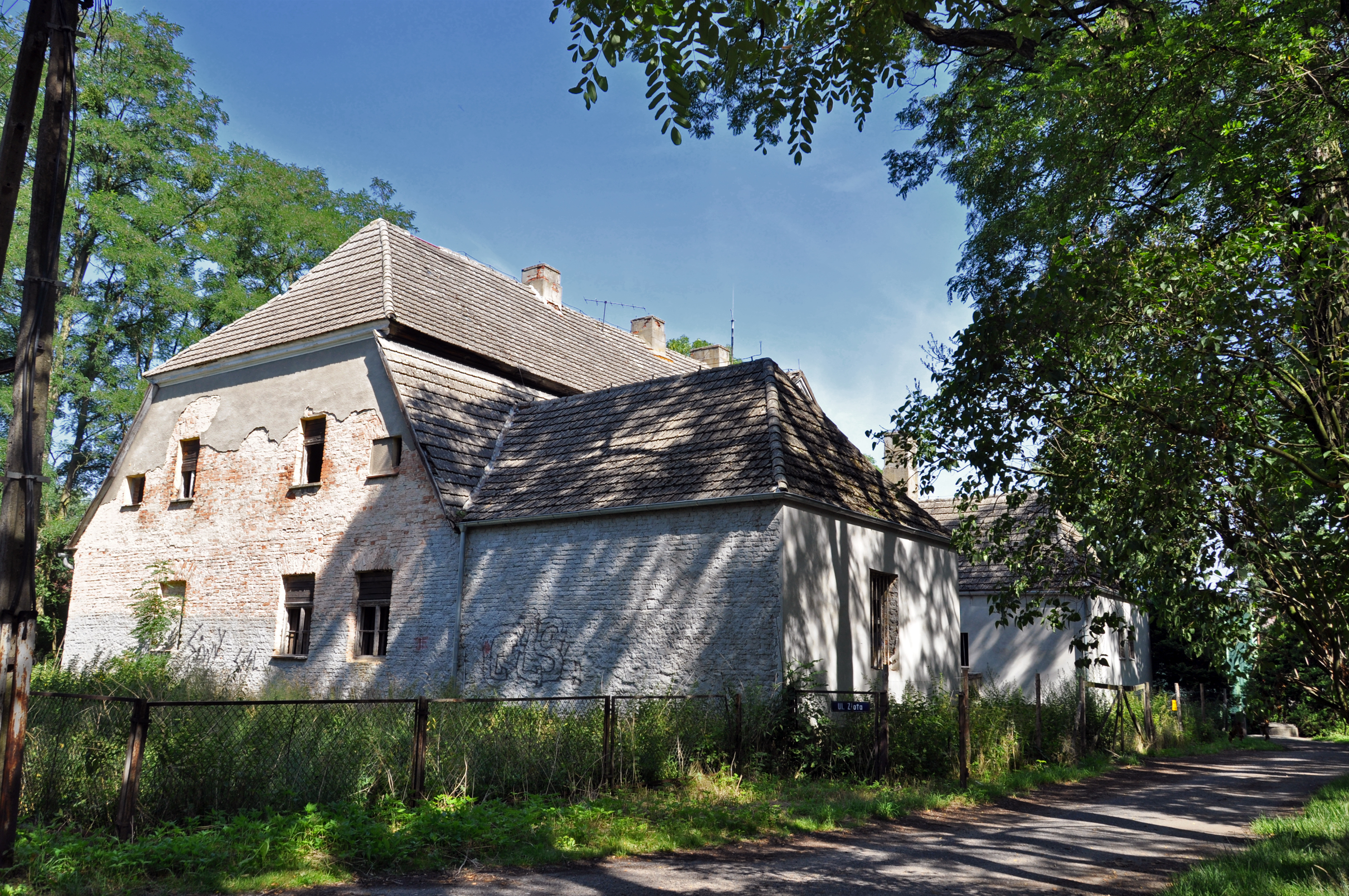 Gorzów Śląski, Dwór z końca XVIII w. przy ulicy Złotej 1